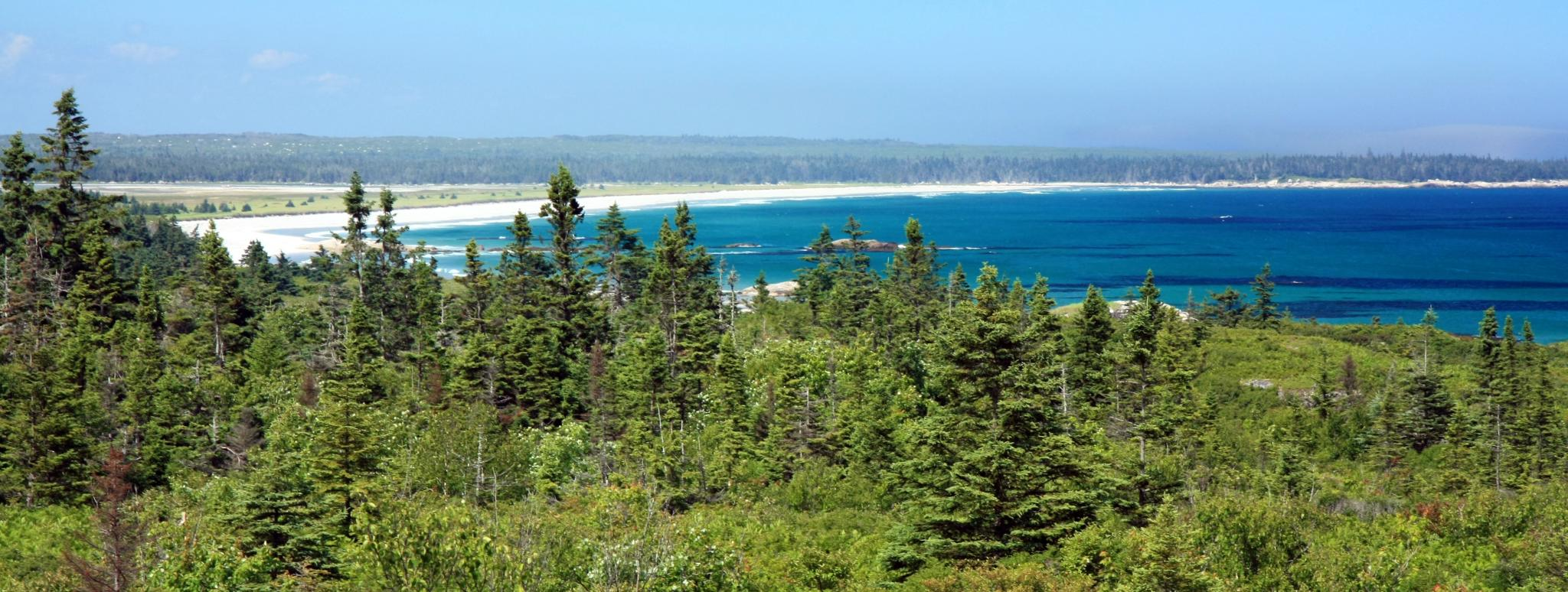 Scène de l'annexe côtière du parc national de Kejimkujik